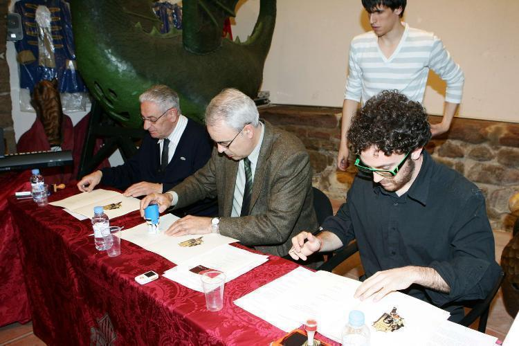 Signatura de la modifiació de 2008 del Protocol del Folklore Geganter de les Diades del Corpus i de la Festa Major, per part dels presidents de les tres parts sotasignants.